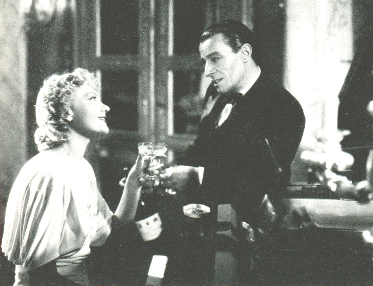 Isa Miranda e Luis Hurtado in Documento Z 3 (Guarini, 1942)